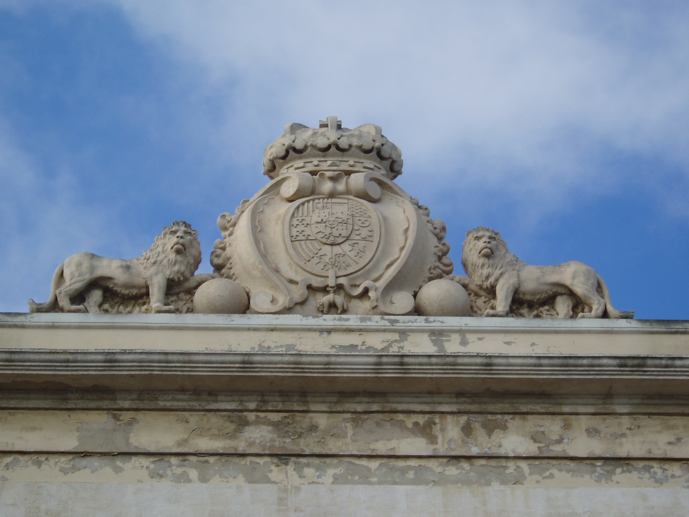 Cárcel Real de Cádiz (detalle)